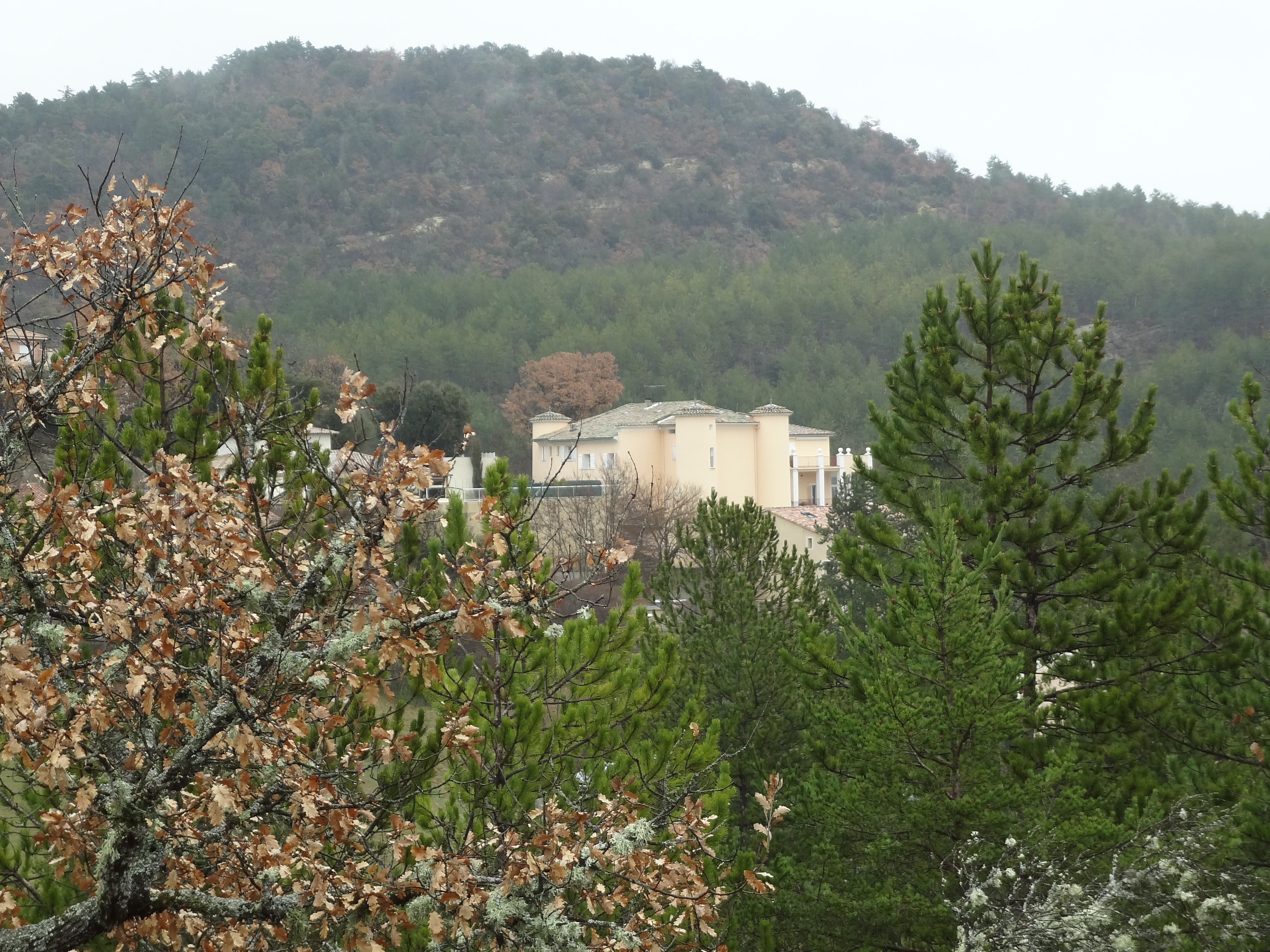 Maison noble du XVIIe